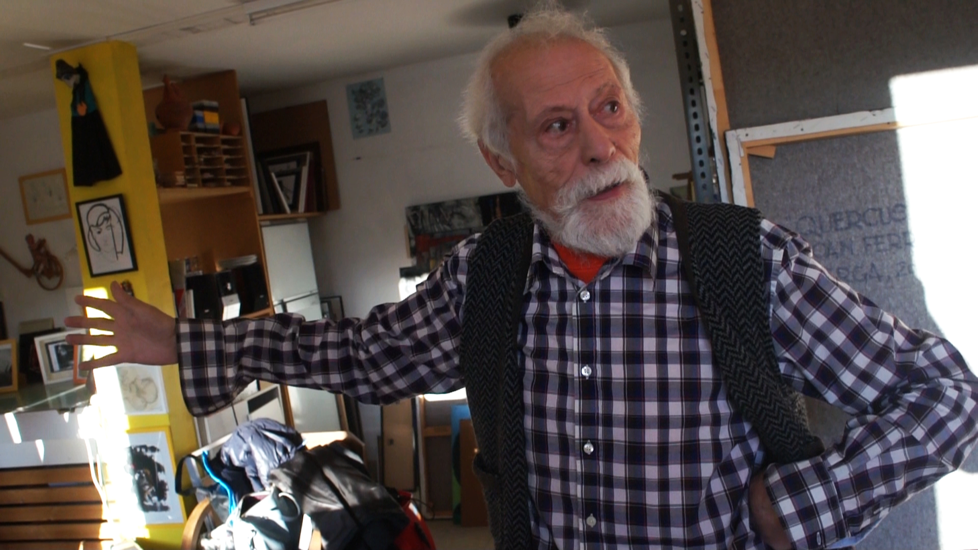 L'artista Joan Ferrer i Gasol (Berga, 1937) al seu estudi.